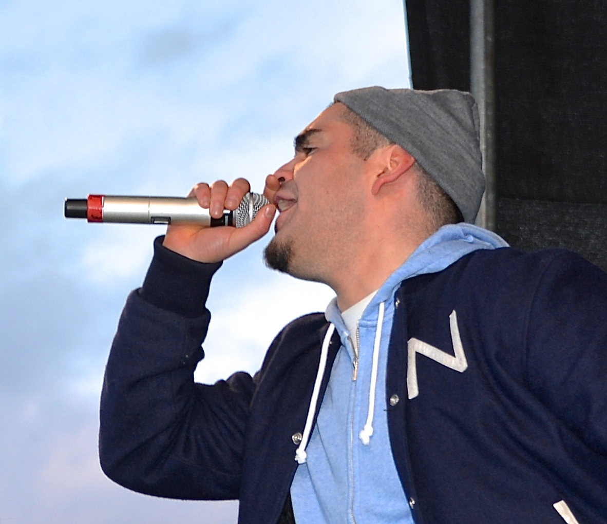 Antirasistdemonstrationen i Kärrtorp den 22 december 2013.